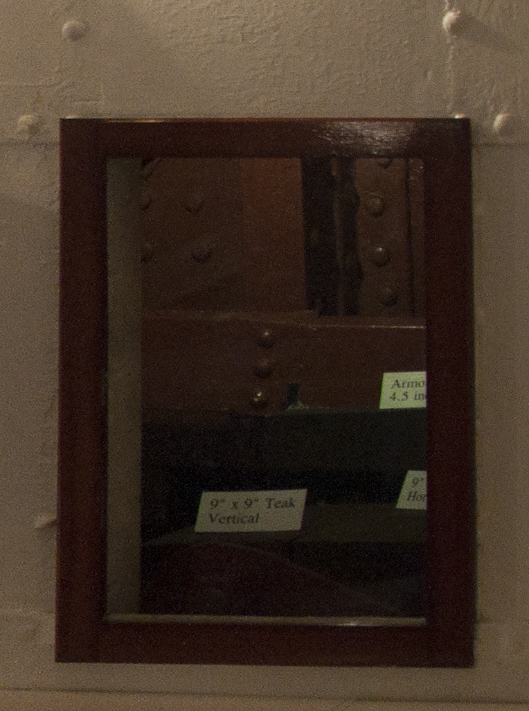 Het pantser van de HMS Warrior, Portsmouth, Engeland